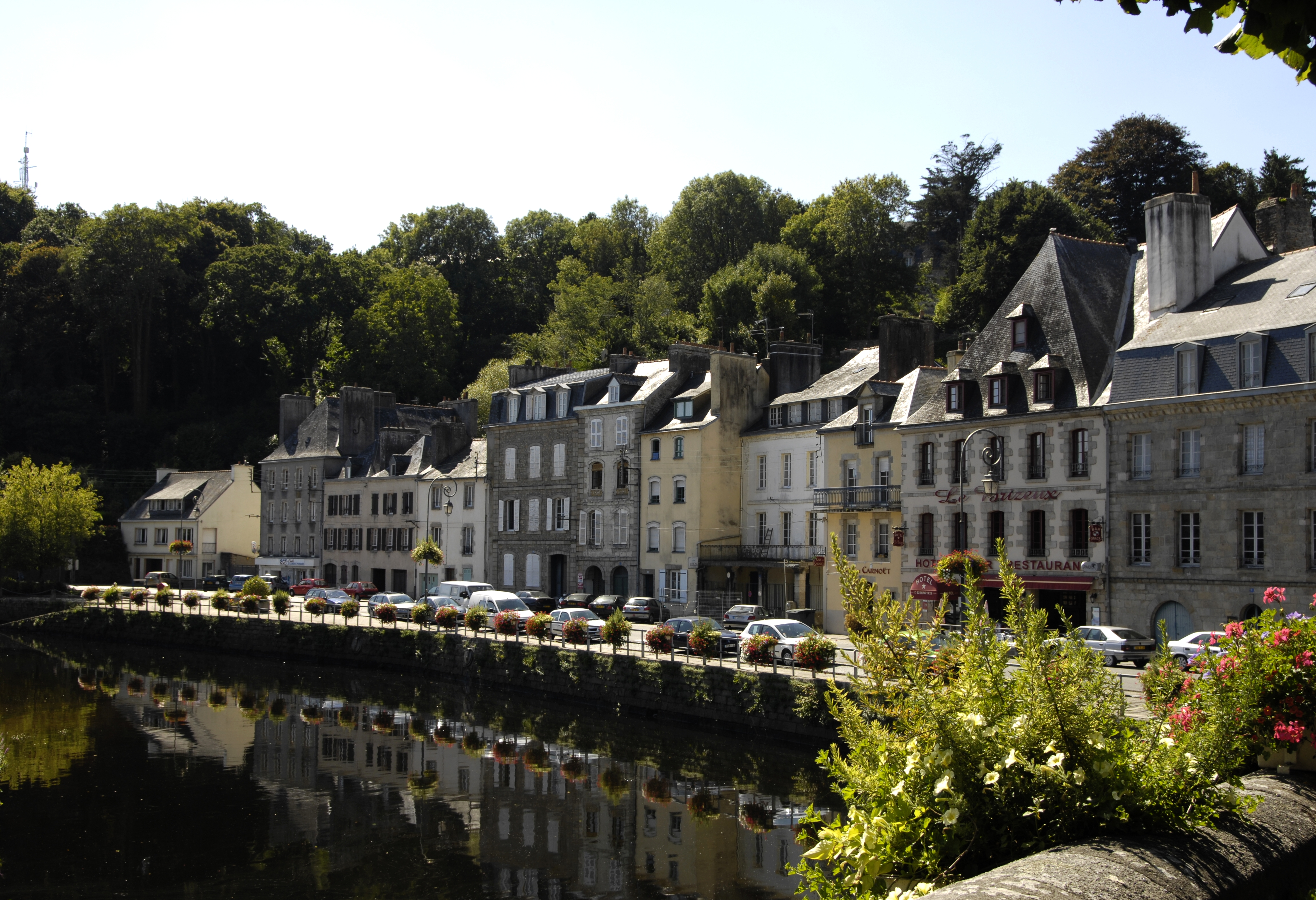 Quimperle, Häuserzeile am Fluss, Bretagne